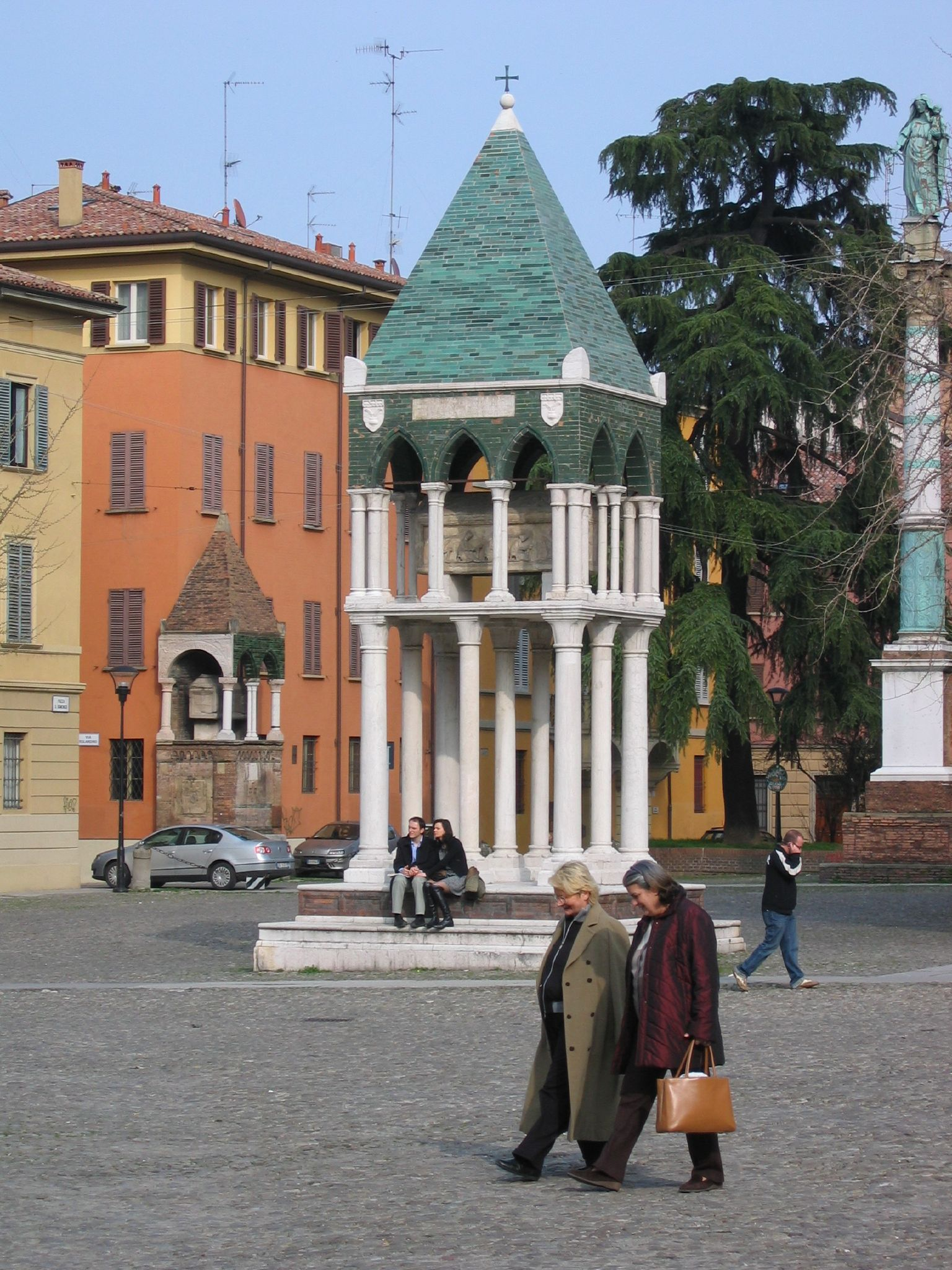 Bologna: Arca del giurista Rolandino de' Passeggeri a San Domenico.